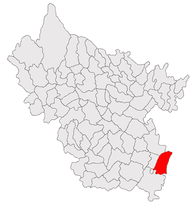 Categorie:Hărţi ale judeţului Buzău